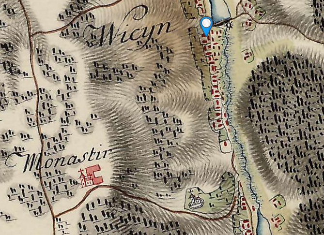 віцин монастир васильян 1695р дер.церква